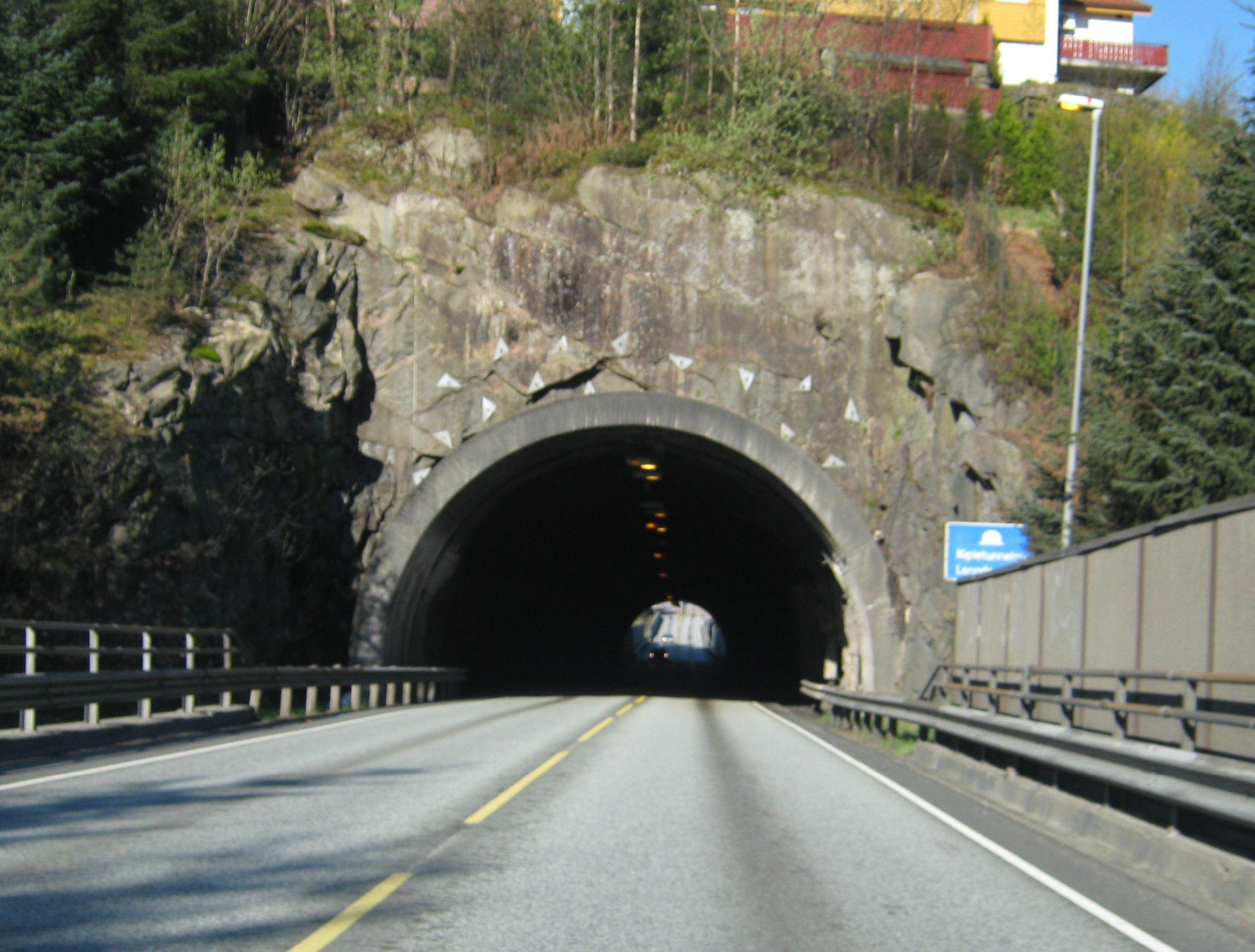 Kipletunnelen ved Godvik i Bergen. Fotografert fra sentrumssiden.